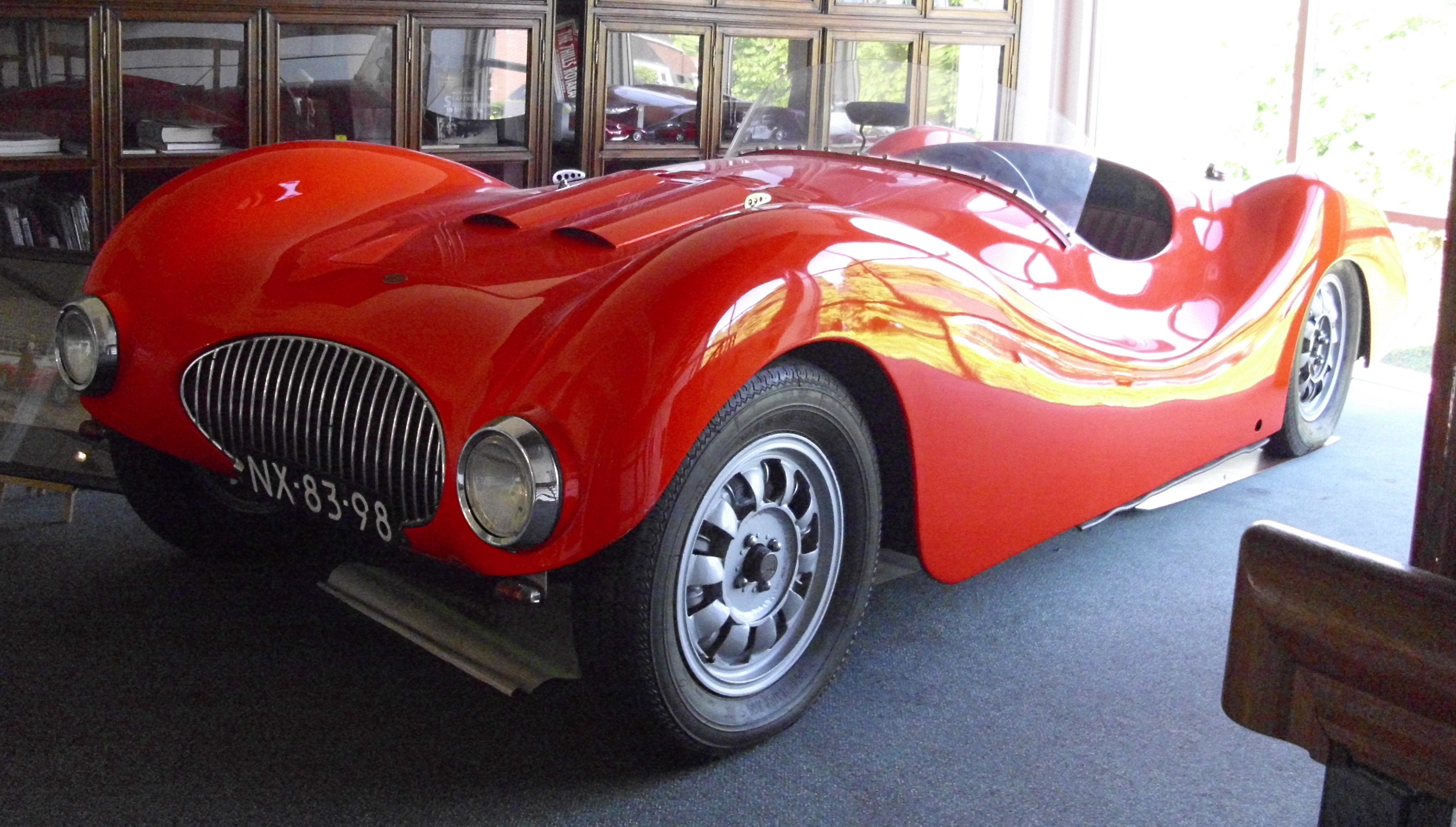 Gatso 1500 Sport Platje Roadster 1948